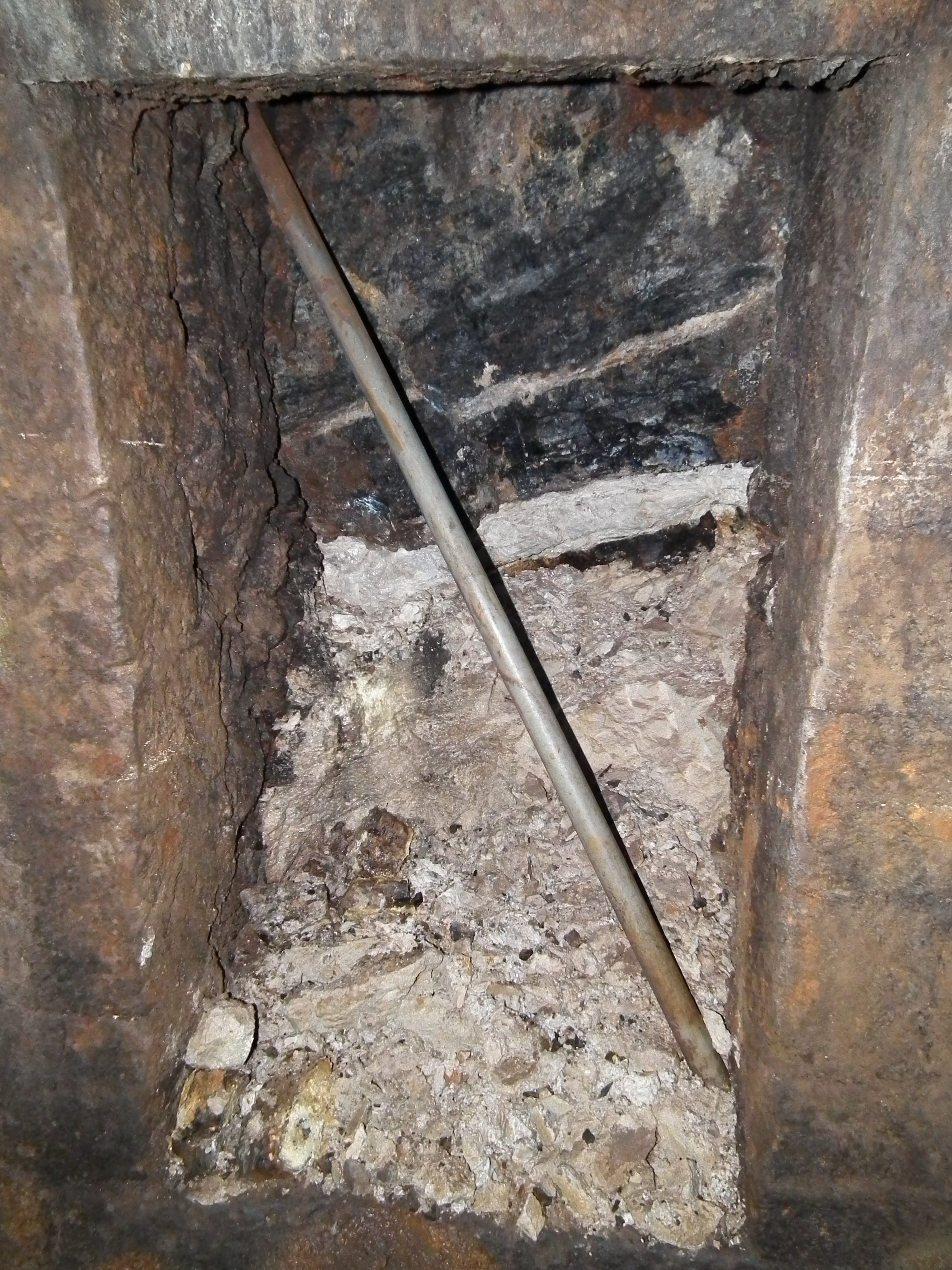 Tiefer Elbstolln ca.5830 m vom Mundloch entfernt; Fenster in das umliegende Gestein , gut zu erkennen die Schieferkohle; Befahrung Wismut-Stollen und Tiefer Elbstolln am 17. September 2015